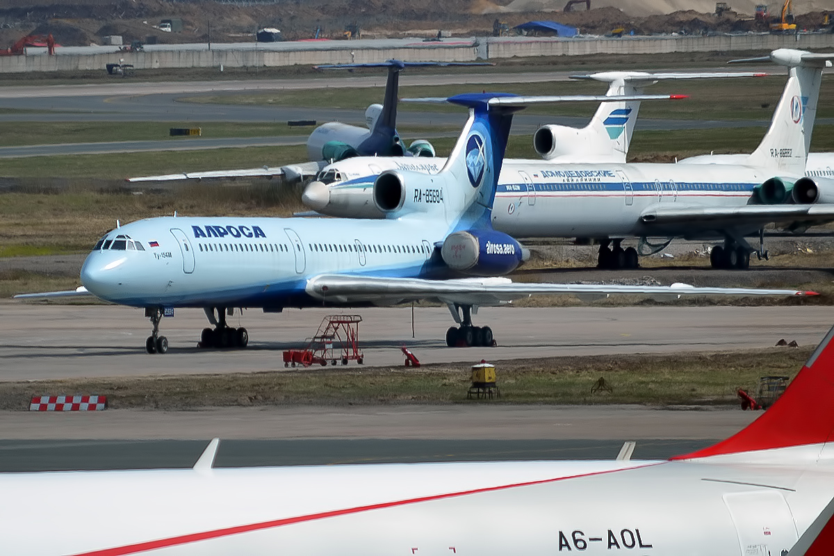 Alrosa, RA-85684, Tupolev Tu-154M